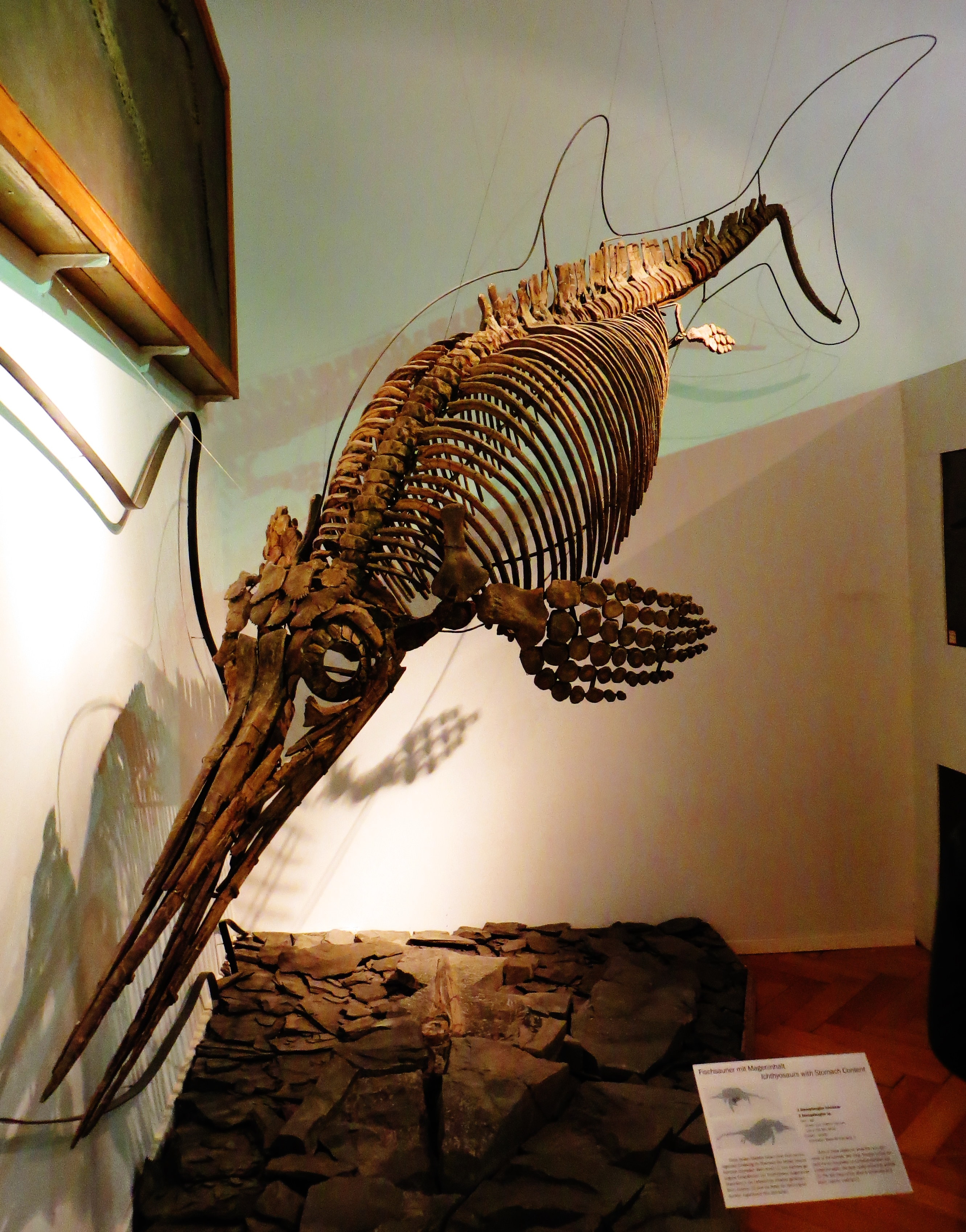 Fossil of Ophthalmosaurus- Took the picture at Museum of Paleontology, Tubingen